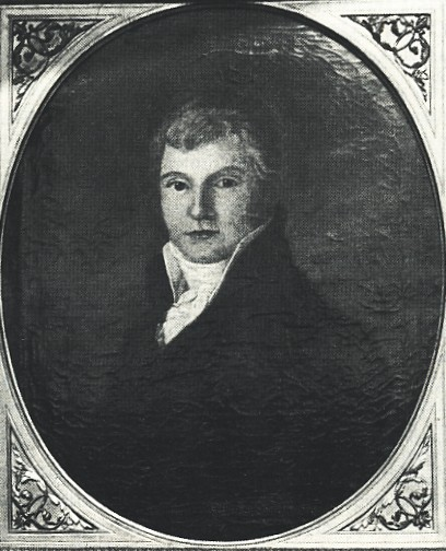 Portrait des deutschen Publizisten Johann Christoph Freiherr von Aretin.